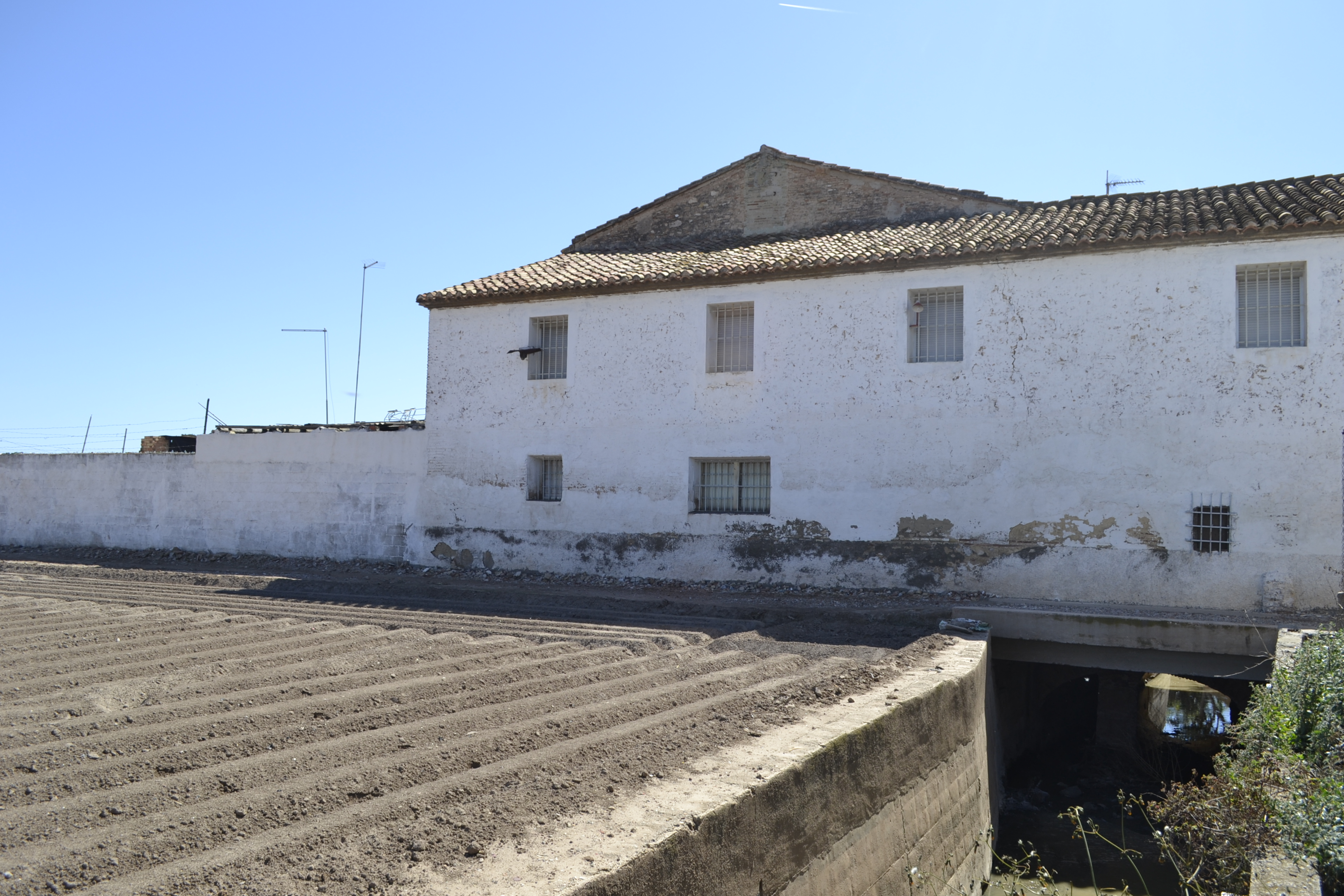 Molí de Farinós, al Camí de Vera (límit entre València i Alboraia).